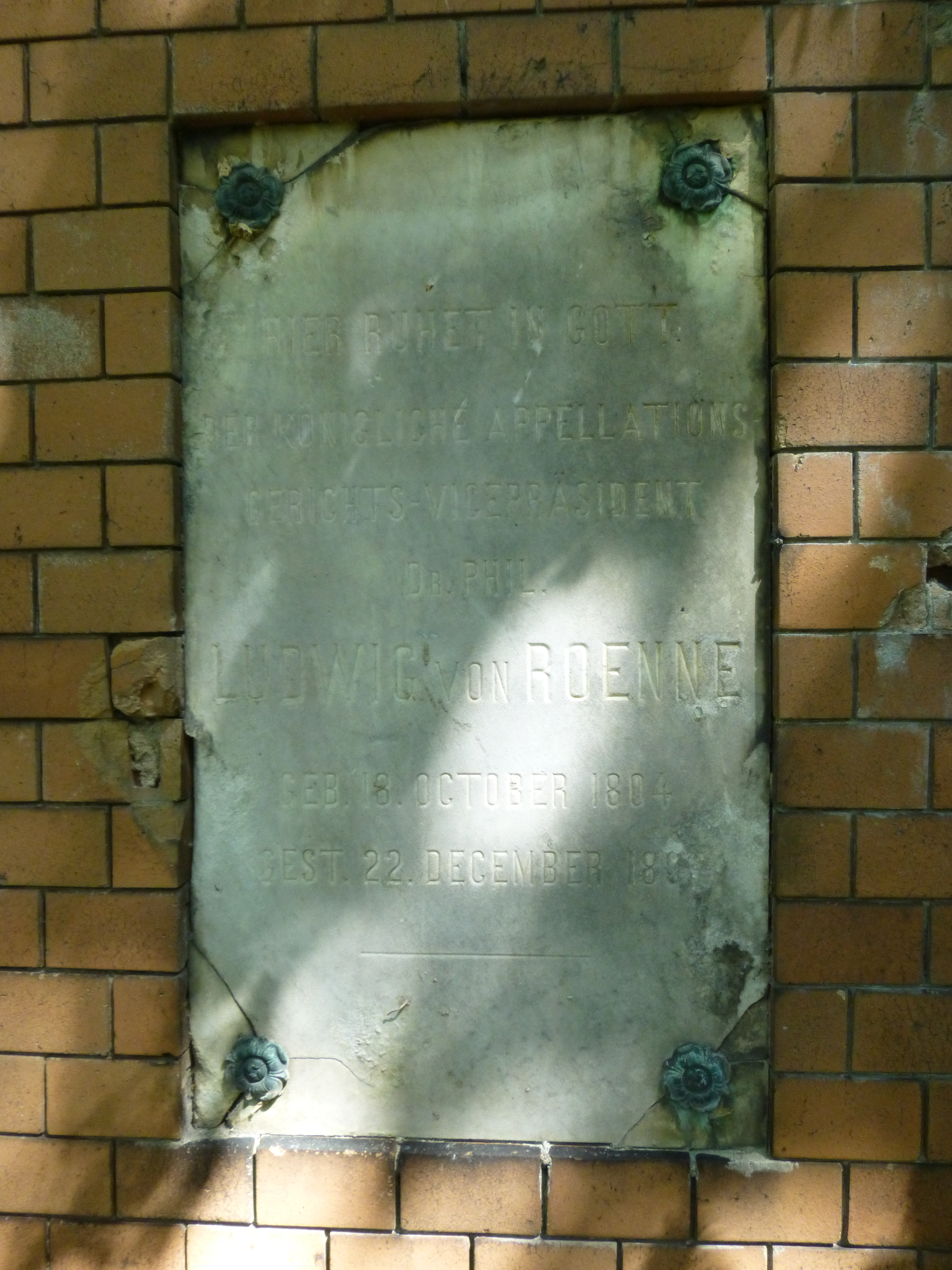 Alter St.-Matthäus-Kirchhof Berlin, Grabtafel auf dem Familiengrab Julius von Roenne / Foto: Wolfgang Schindler